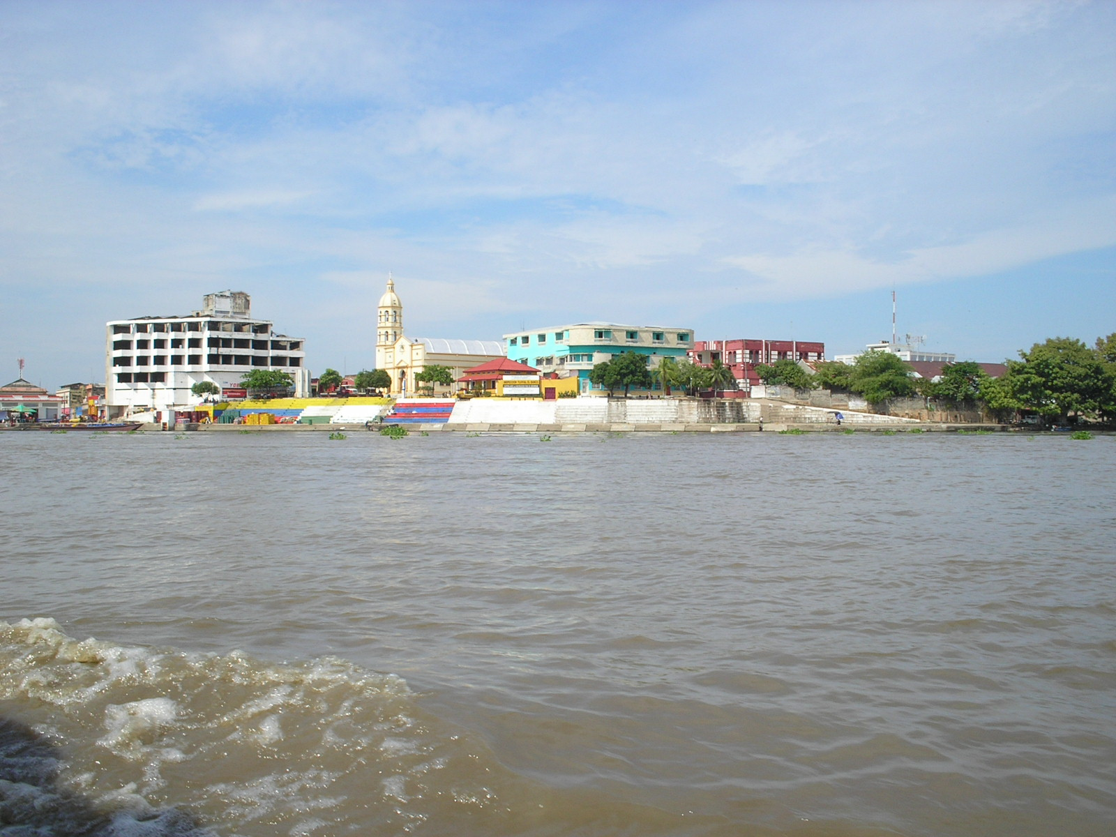 Panoramica de El Banco desde el rio Magdalena